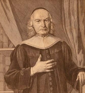 Bildnis Johann Rudolf Rudolf